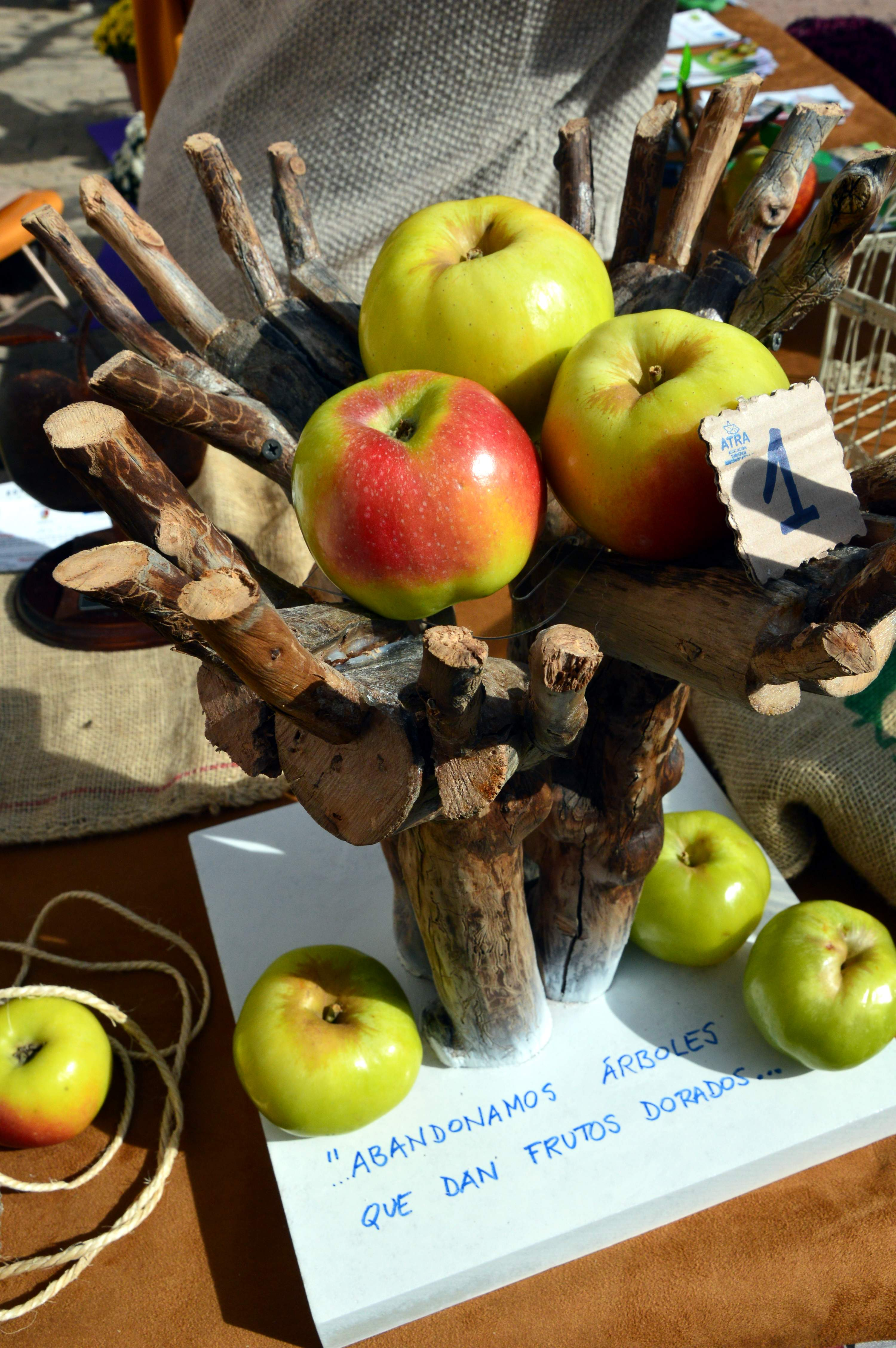 Detalle de manzanas en la VI Fiesta de la Manzana Esperiega (Casasbajas, Valencia), 2018.